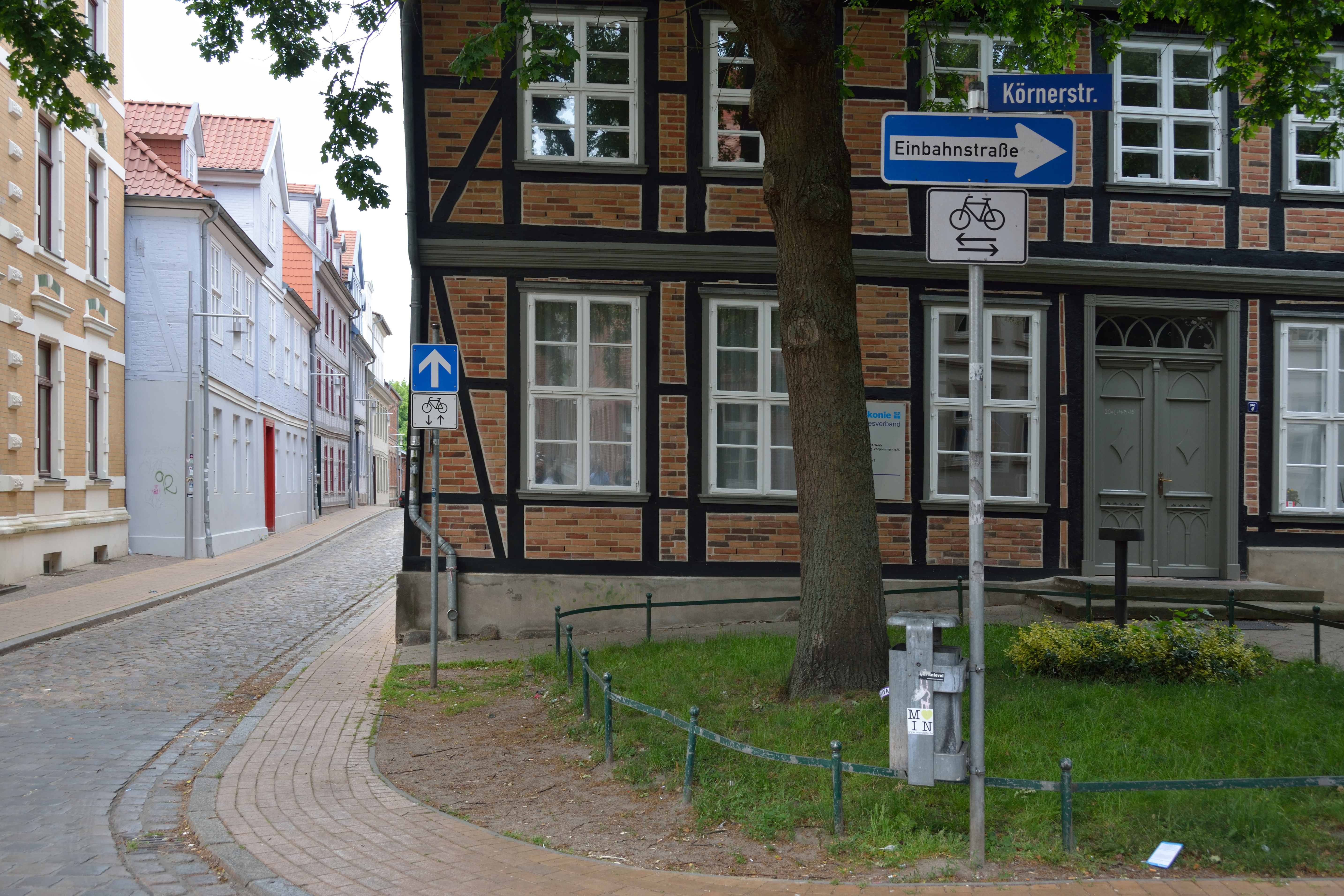 Einbahnstrassenschilder in Schwerin. Einbahnstraßen für Radfahrer in beiden Richtungen freigegeben.